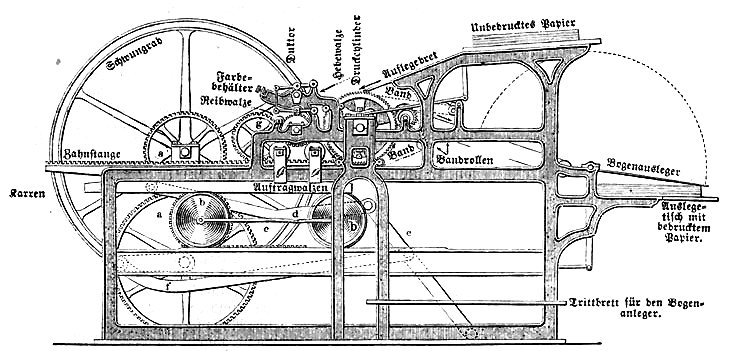 Einfache Schnellpresse